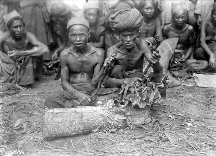 Repronegatief. Het idee om in Deli tabak te verbouwen was veel ouder dan de Europese plantages die er vanaf de jaren '60 van de 19e eeuw opgericht werden. De Europese tabaksplanters hadden gezien hoe goed de tabak erbij stond die de Bataks verbouwden. Tabak was geen gewas dat oorspronkelijk in de Archipel voorkwam. Net als maïs kwam het uit Amerika. De bevolkingstabak in de Bataklanden werd allen voor eigen gebruik en voor de lokale markt verbouwd. In sommige streken van Sumatra, zoals de hoger gelegen delen van de Padangse Bovenlanden, Benkoelen en Palembang, werd er door de lokale bevolking tabak voor de export verbouwd. (P. Boomgaard, 2001). Batakse tabakverkopers met verpakte tabak voor de inlandse markt welke per lengtemaat verkocht wordt